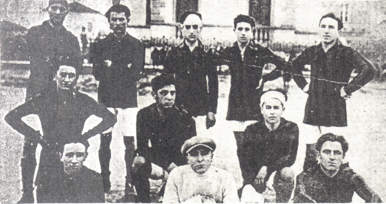 Prima foto di una squadra di calcio di Lanciano: la Virtus nel 1922